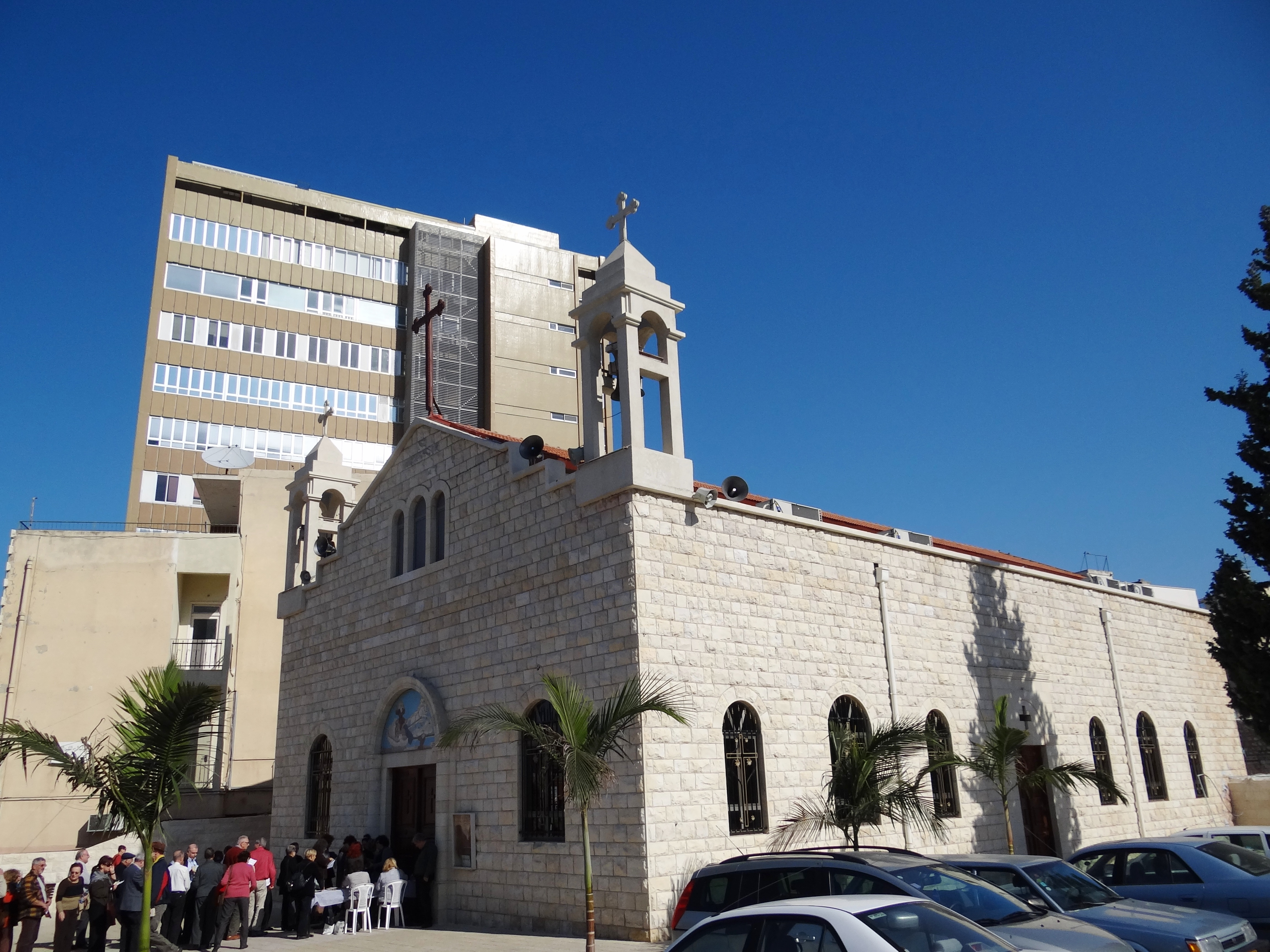 St. Elias Cathedral of the Melkite Catholic Haifa Israel קתדרלת אליהו הנביא של הכנסייה המלכיתית היוונית-קתולית בחיפה